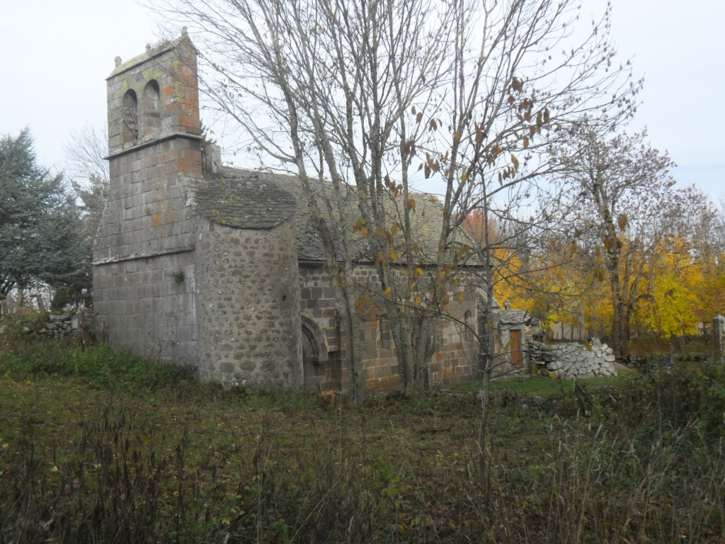 Eglise de Saint-Maurice (Cantal), vue du côté du clocher.